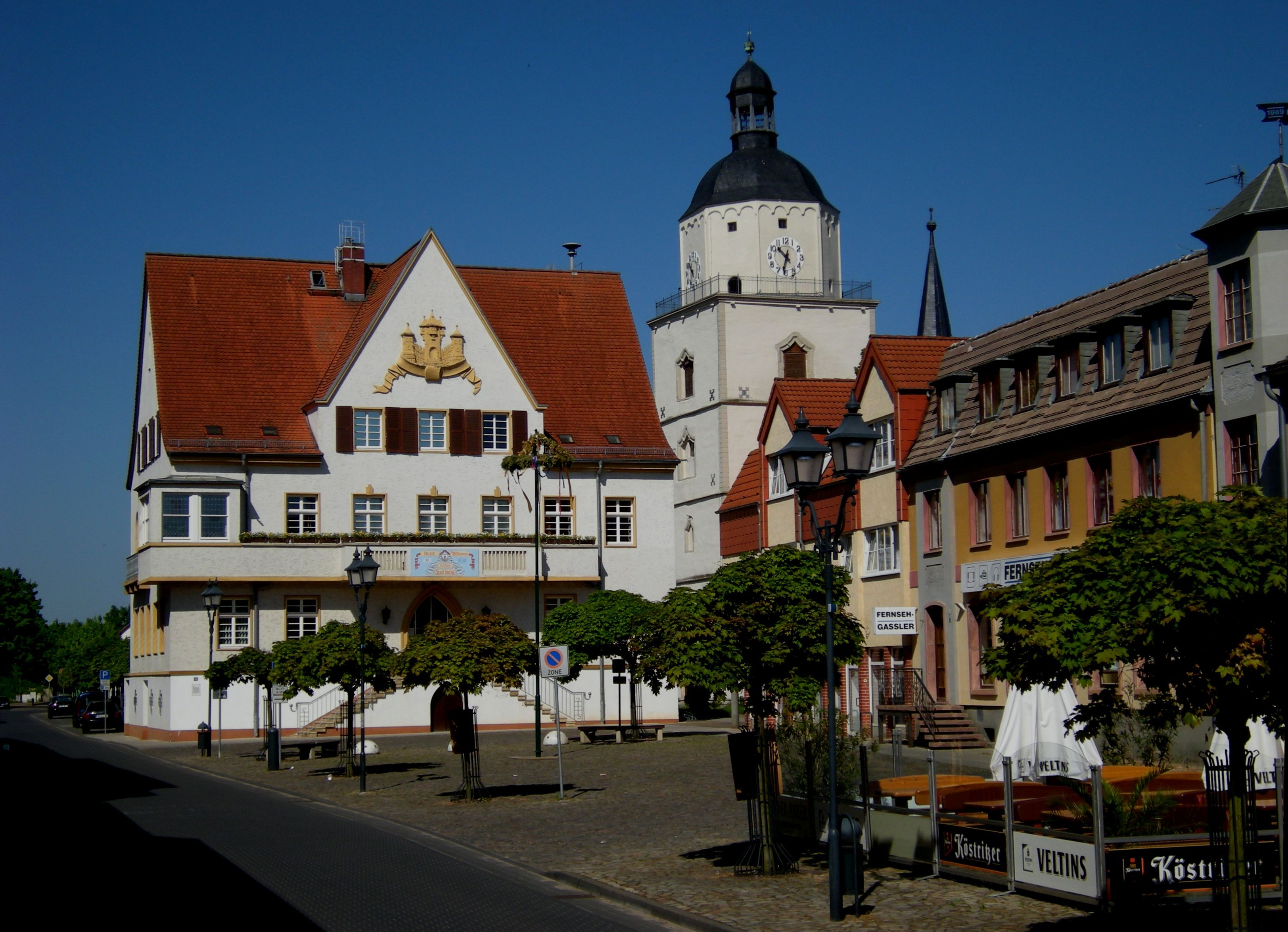 Barby-Marktplatz mit Kirche.jpg